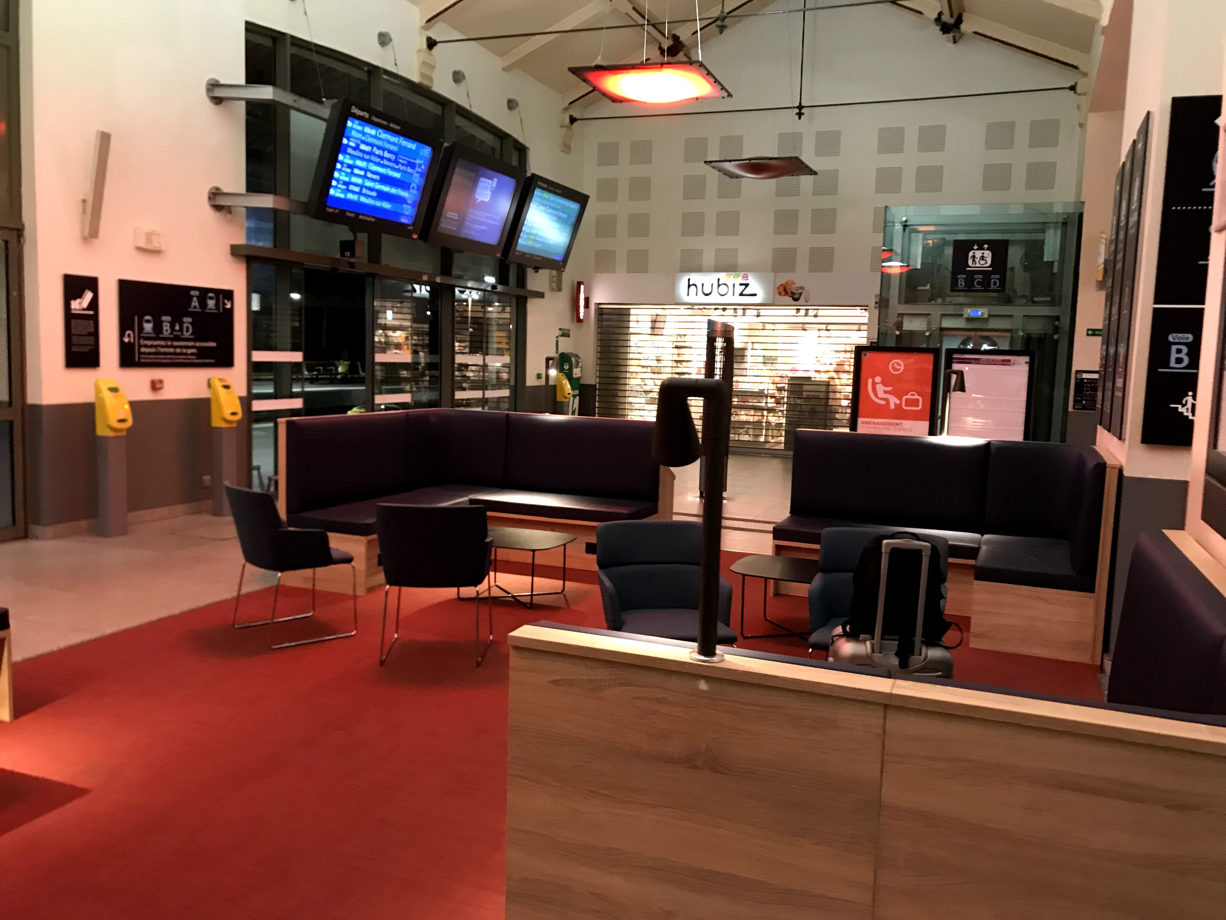 Intérieur de la Gare de Vichy, 2019.